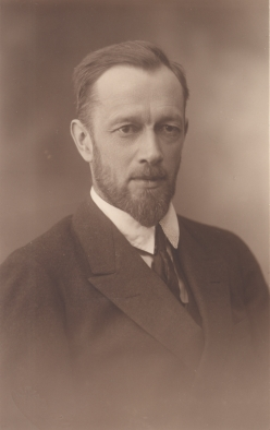 Ernst Masing